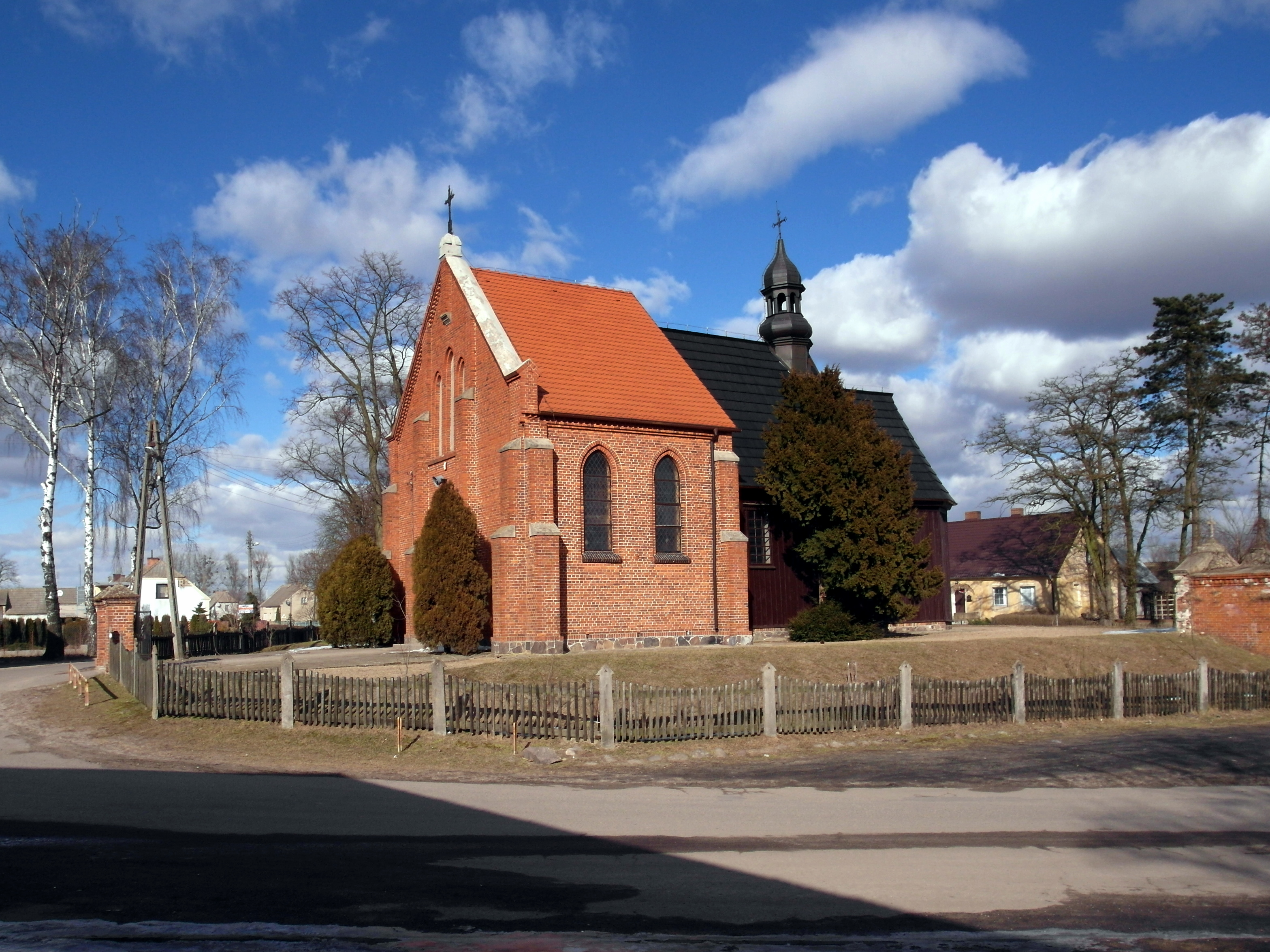 Murzynowo Kościelne - rzymskokatolicki kościół parafialny p.w. św. Jana Chrzciciela, poł. XVIII, 1900